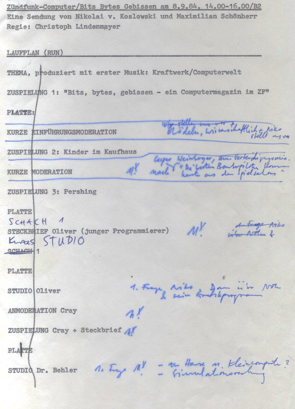 Sendeablaufplan der ersten reinen Computersendung im ARD-Hörfunk, Vorläufer der Serie "bit, byte, gebissen - das Computermagazin im Zündfunk". Erste von drei Seiten des Laufplans der Zweistundensendung am 8. September 1984, 14.00-16.00 Uhr, Zündfunk, Bayern 2, Bayerischer Rundfunk. Im Laufplan stehen oben die beiden Moderatoren und Entwickler des Konzepts der Sendung, Nikolai von Koslowski und Maximilian Schönherr. Der Laufplan enthält zahlreiche kurz vor Sendebeginn handschriftlich geänderte oder präzisierte Texte. Die Sendung diente als Test, ob das Thema trägt. Sie hieß noch nicht "bit, byte, gebissen", sondern "Bits, Bytes, Gebissen".